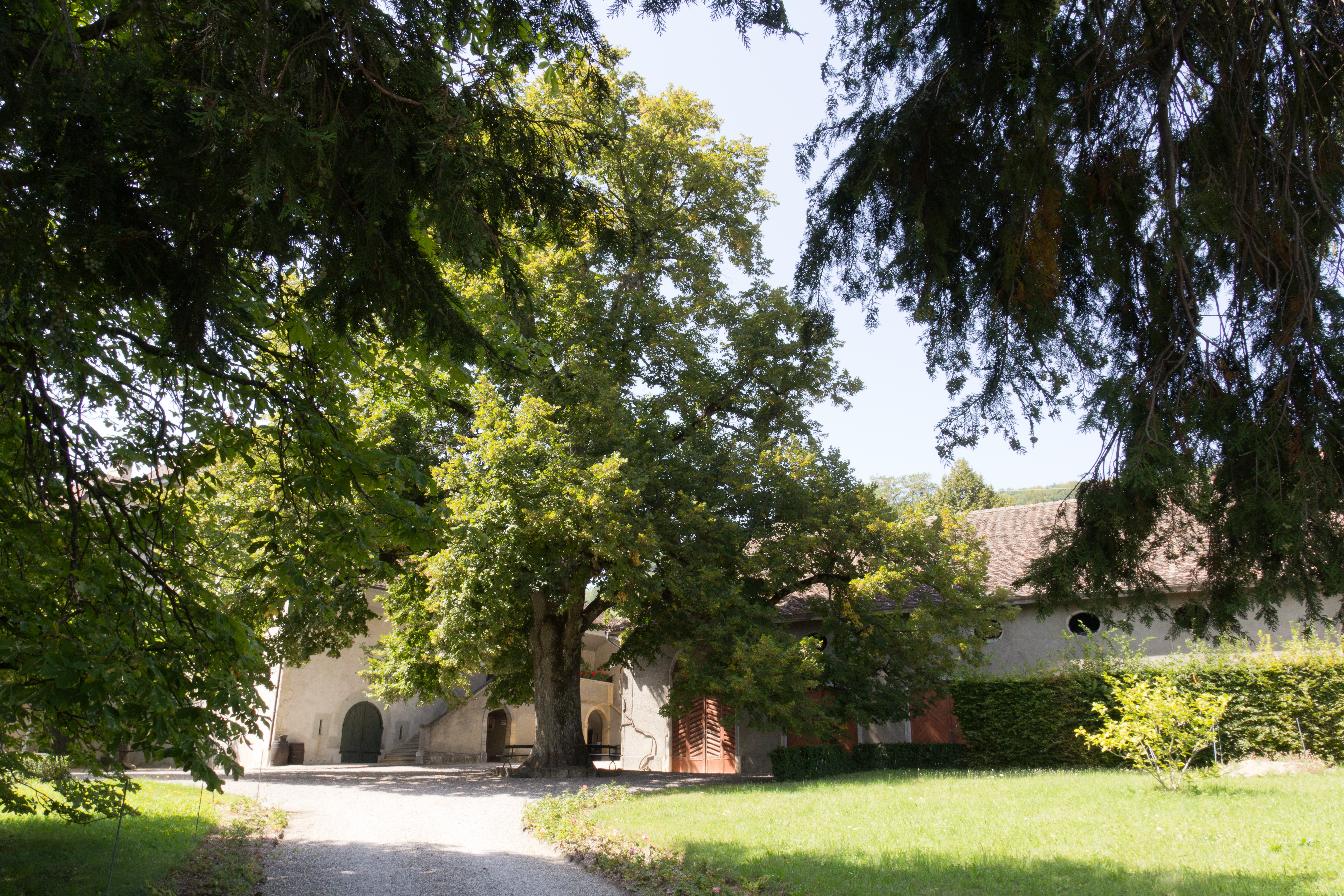 Une allée de gravier traverse une pelouse vers le bâtiment principal, au fond. Une dépendance se trouve sur la droite.